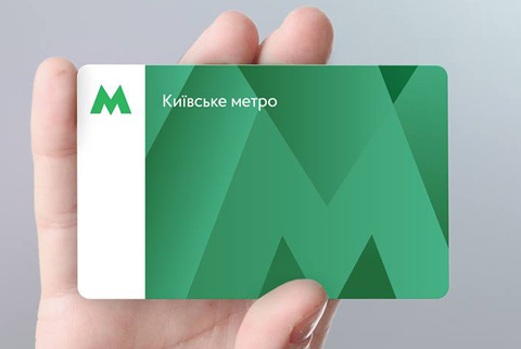 Безконтактна картка київського метро